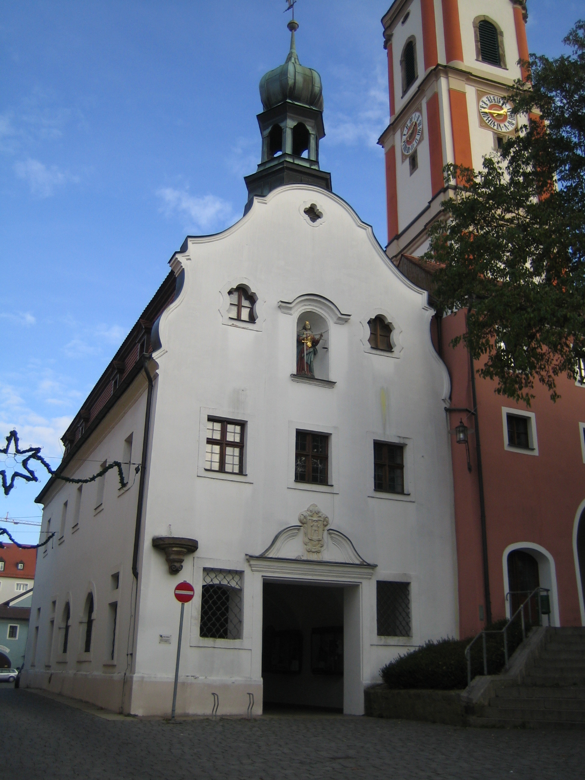 Inhalt: Altes Rathaus Roding Neubau 1661 im Renaissancestil, in der 2. Hälfte des 18. Jahrhunderts im Barockstil auf- und ausgebaut. Barocker Schweifgiebel. Erstellt von Denis Apel / Datum: 11.11.2008